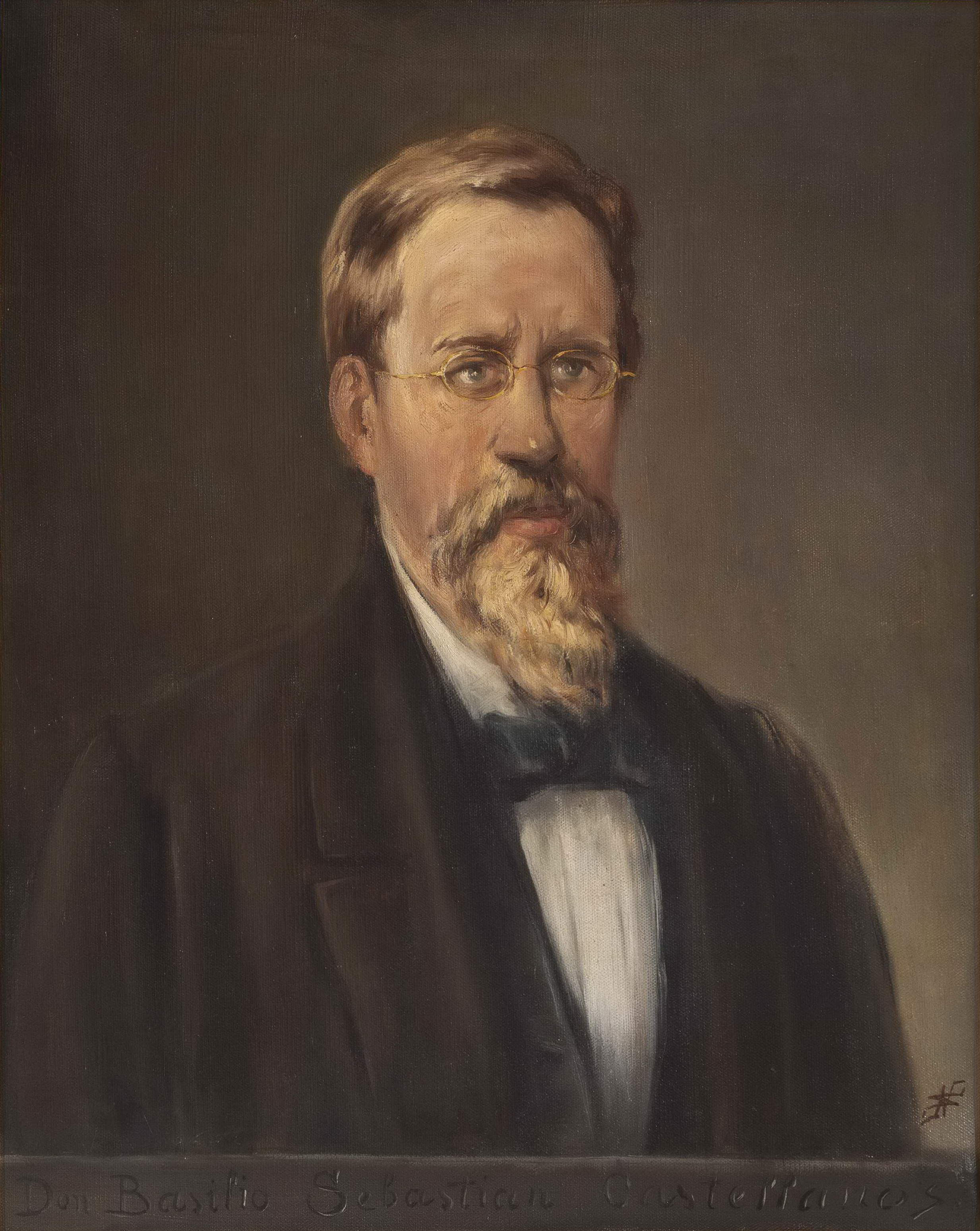 Basilio Sebastián Castellanos de Losada.